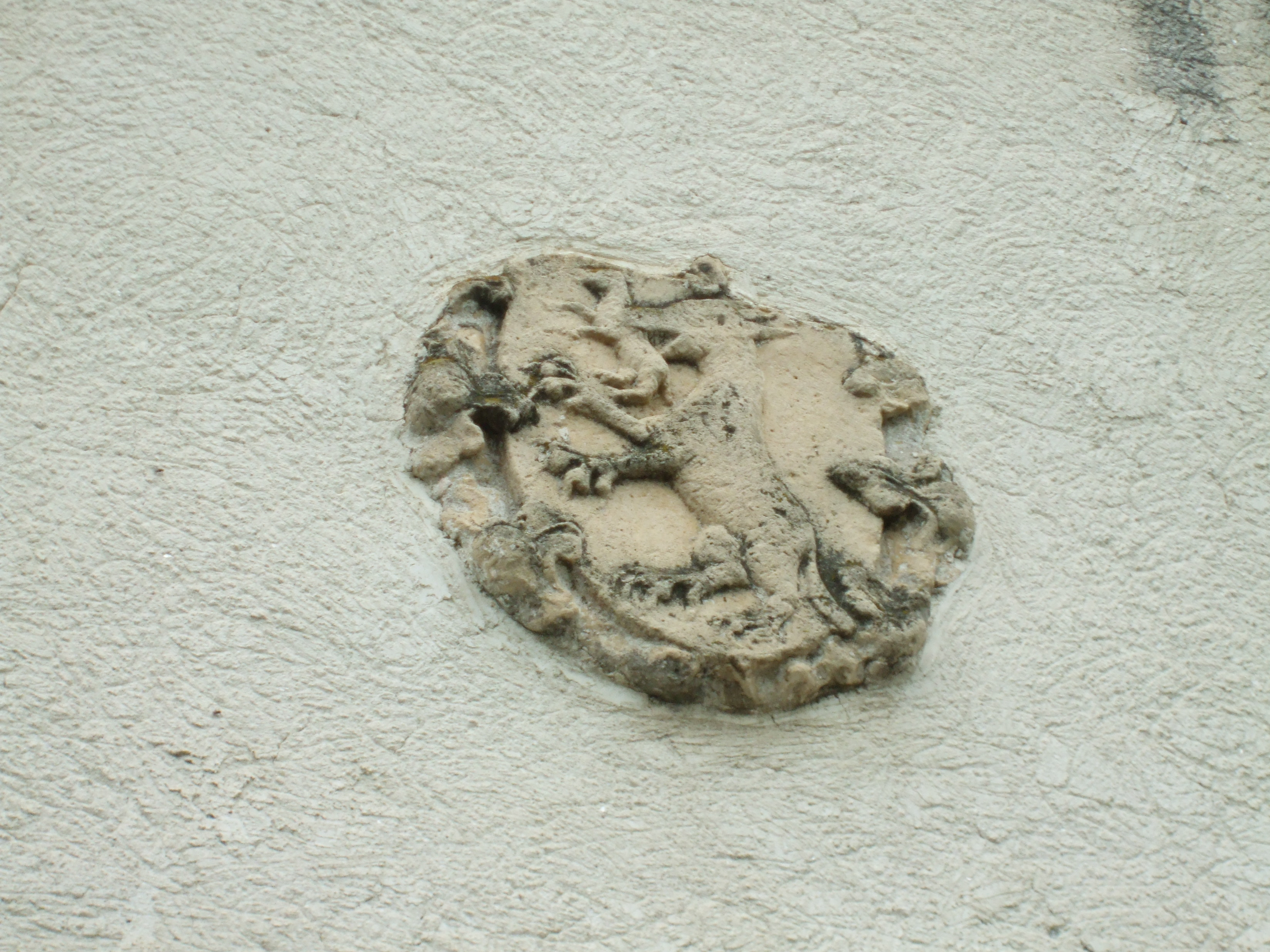 Biserica Unitariana din Suatu- Stema cu lupi a fam.nobiliare Suky.